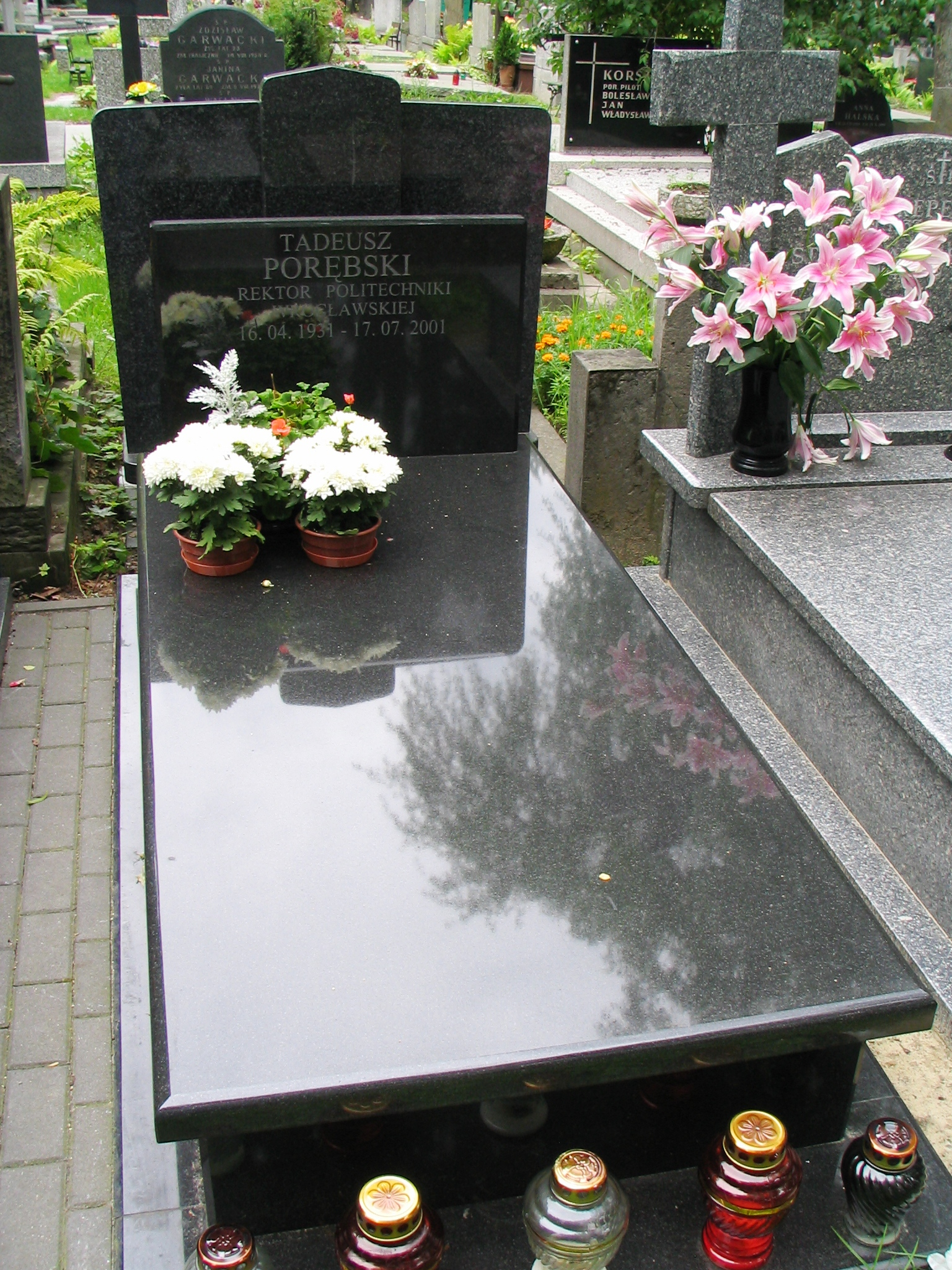 Grób rektora Tadeusza Porębskiego